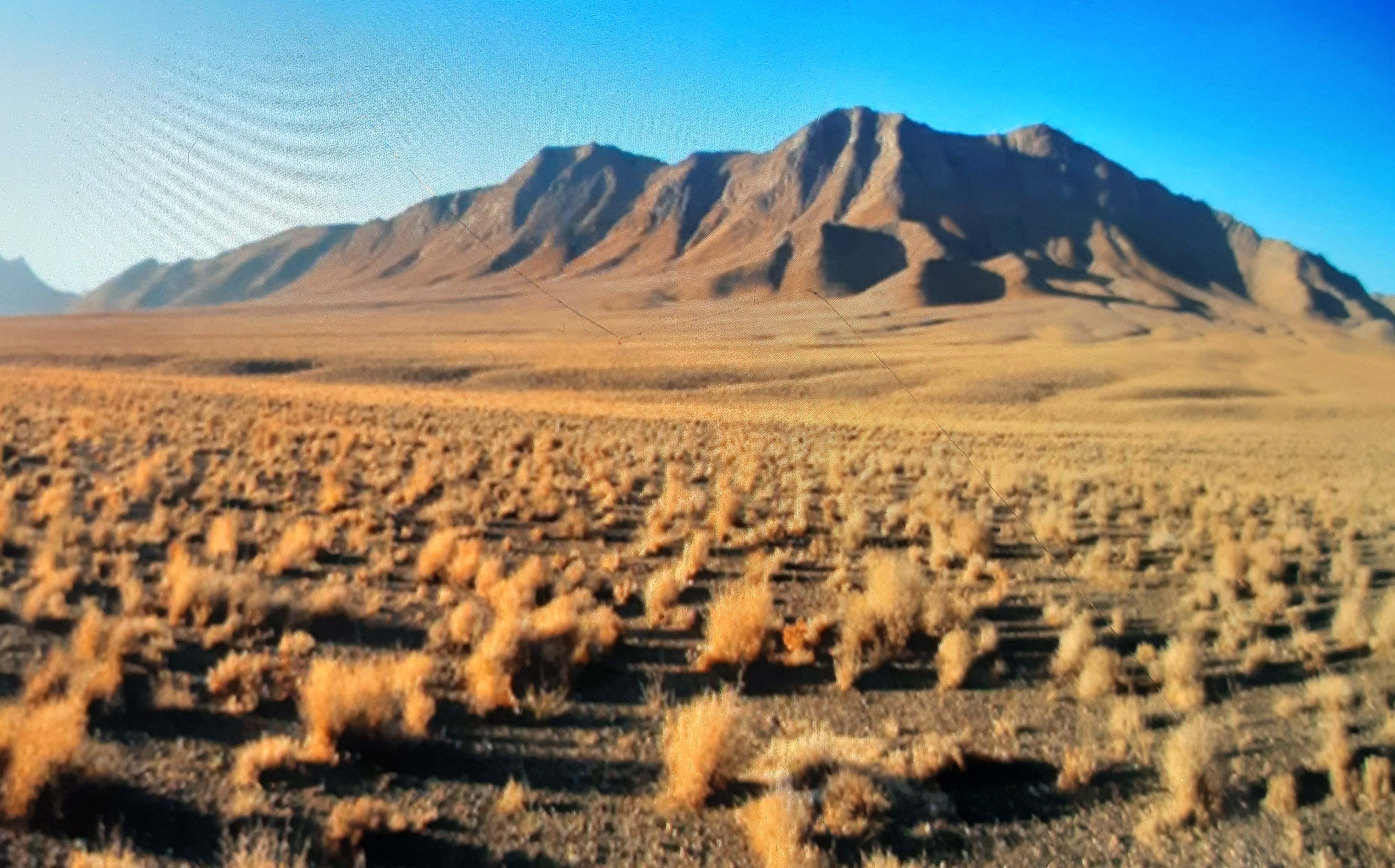 صحرای قمیشلو